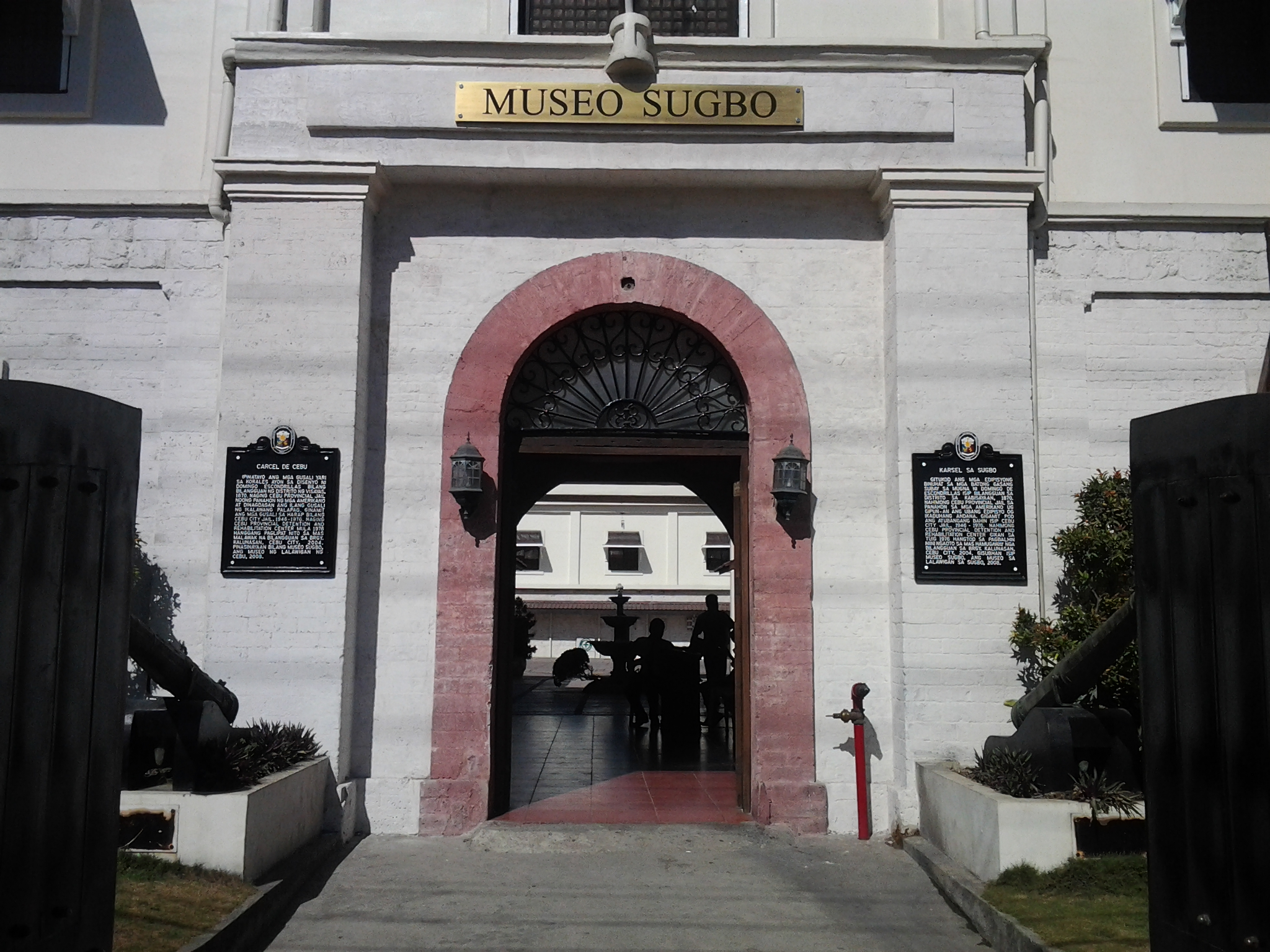 Bikol Central: Museo kan Cebu